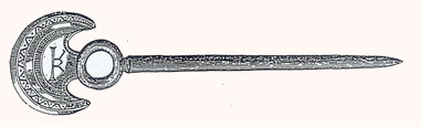 Mine de plomb du Moyen Age trouvée dans la Seine au Second Empire. Dessin dans le domaine public - Photo par LessayCatus 17:57, 7 December 2006 (UTC)